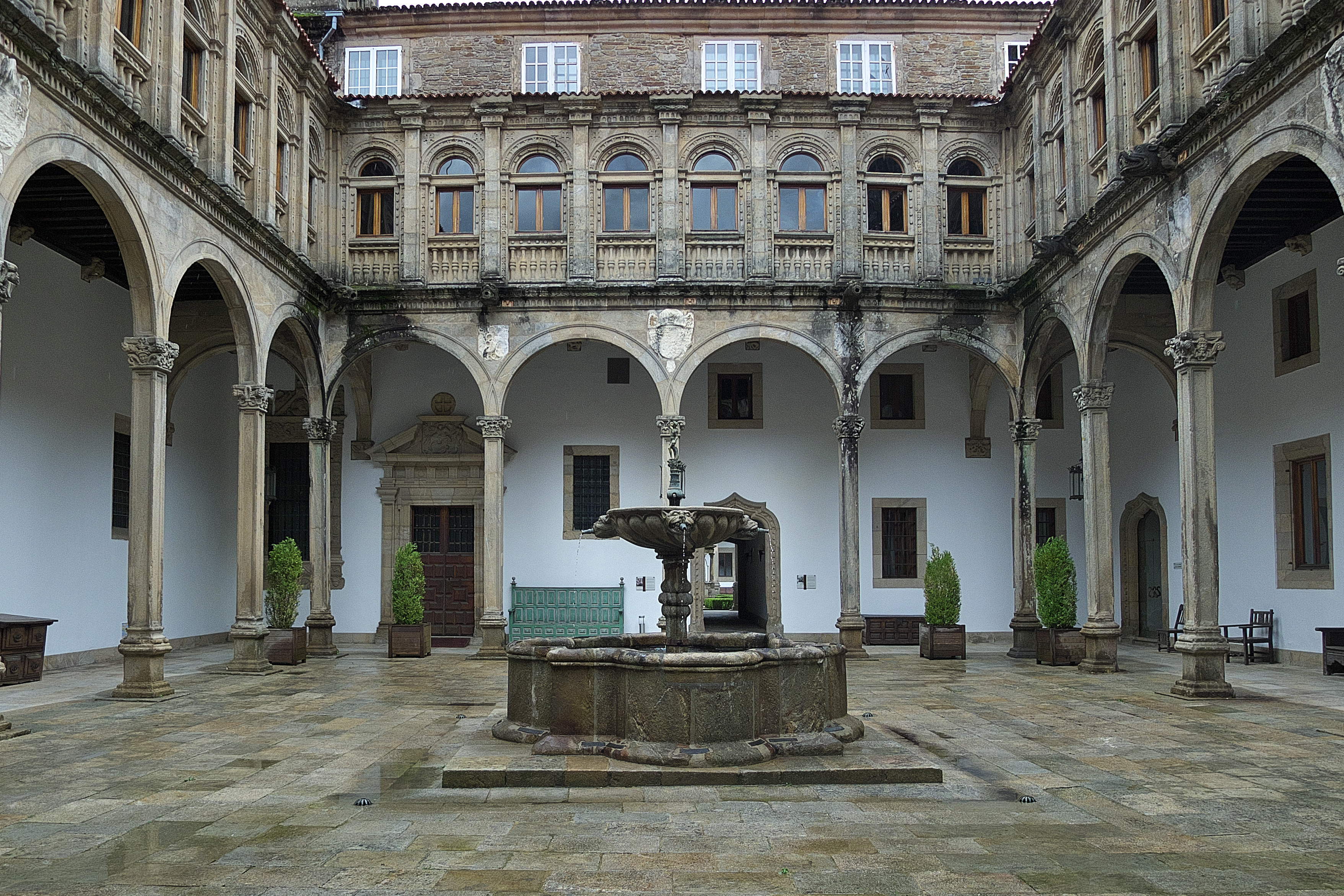 Rodrigo Gil de Hontañón reedifica este Patio de la Cocina por el mal comportamiento de la piedra (1561). En este patio se ubicaba la principal cocina del hospital, con dependencias para la inclusa, enfermería y cárcel.